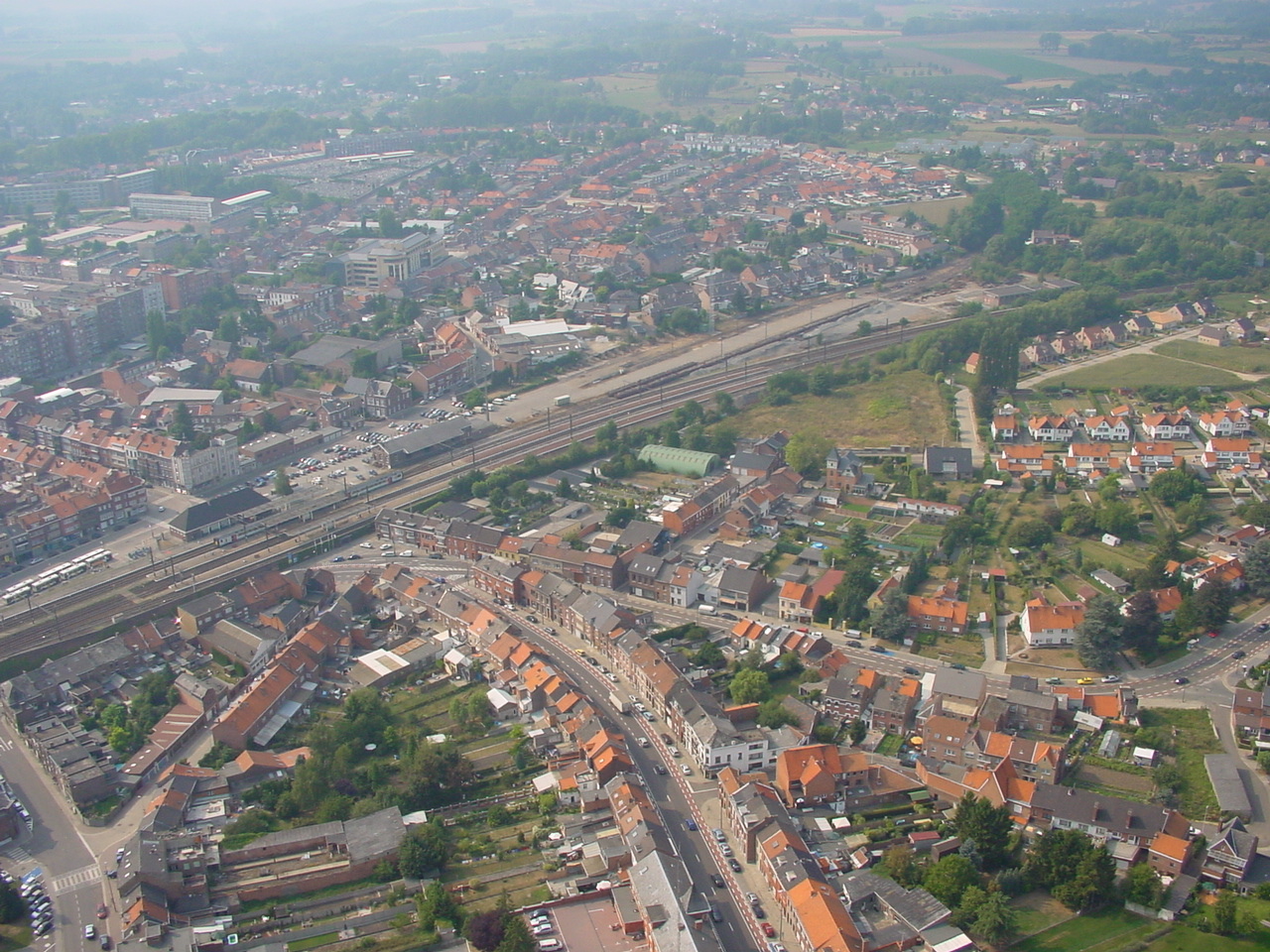 Luchtfoto van Tongeren (station). Zelf gemaakt België Tongeren